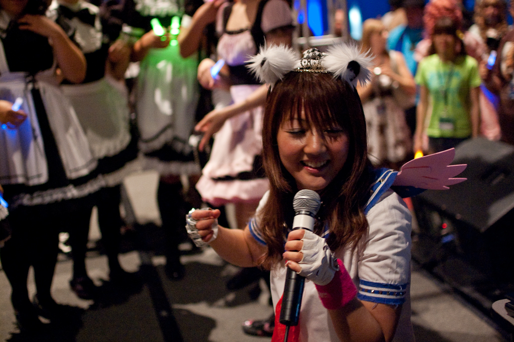 Haruko Momoi